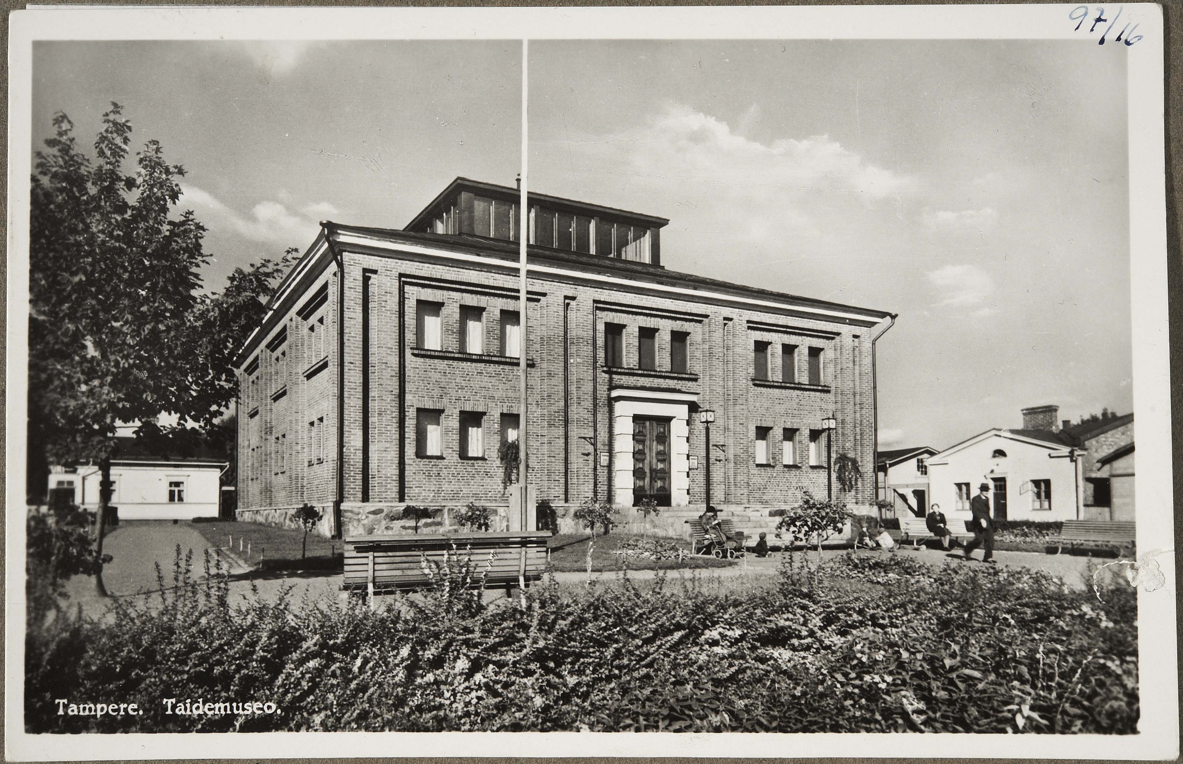 Kuva on otettu Tampereen taidemuseon edustalta Amurin kaupunginosasta. Uusklassismia edustava museorakennus on entinen kruunun viljamakasiini (arkkitehdit C. L. Engel ja Anton Wilhelm Arppe, 1838). Talo muutettiin taidemuseoksi 1930-luvun alussa (arkkitehti Hilja Gestrin).